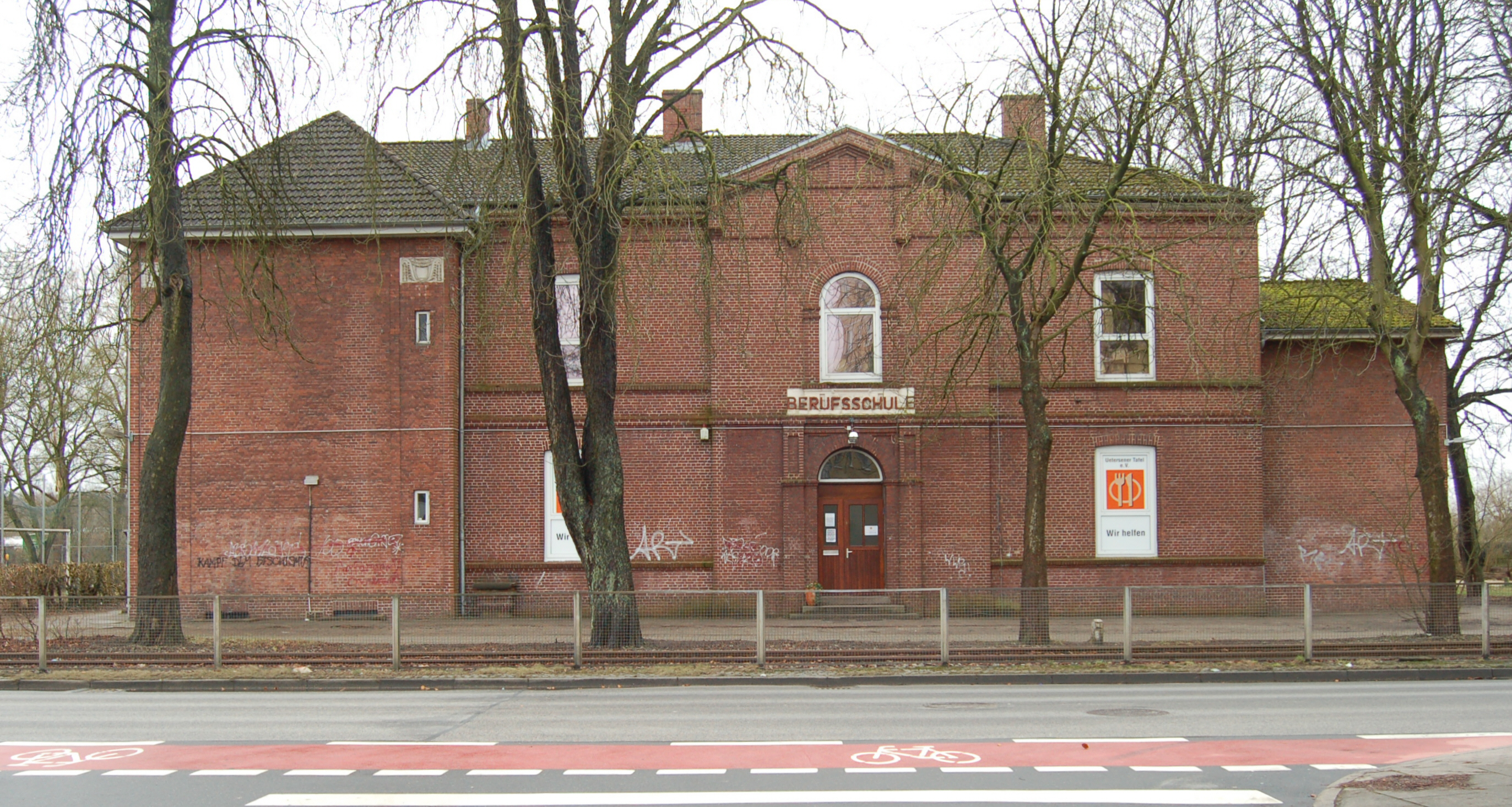 Die ehemalige Berufschule "Finkenbrook" in Uetersen, heute Sitz der Uetersener Tafel.